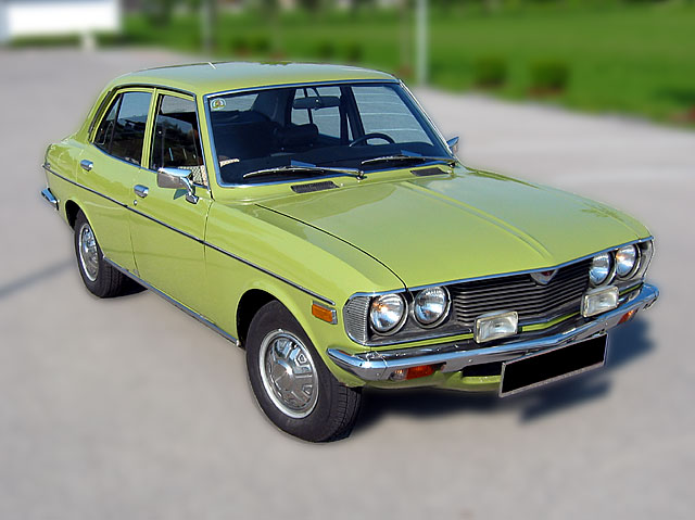 Mazda 616 Sedan (1977) Sonstiges: ...